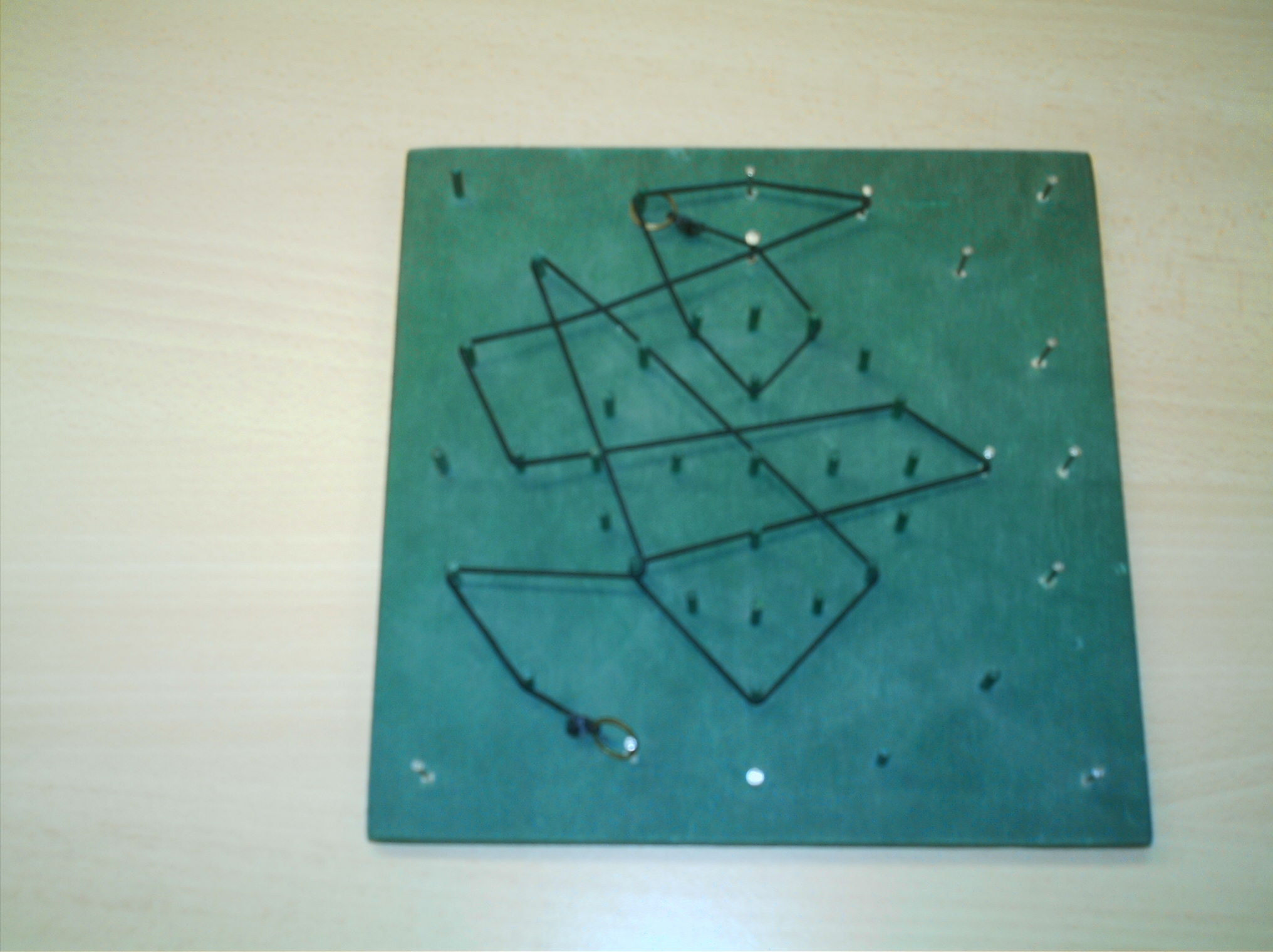 geoplanoa